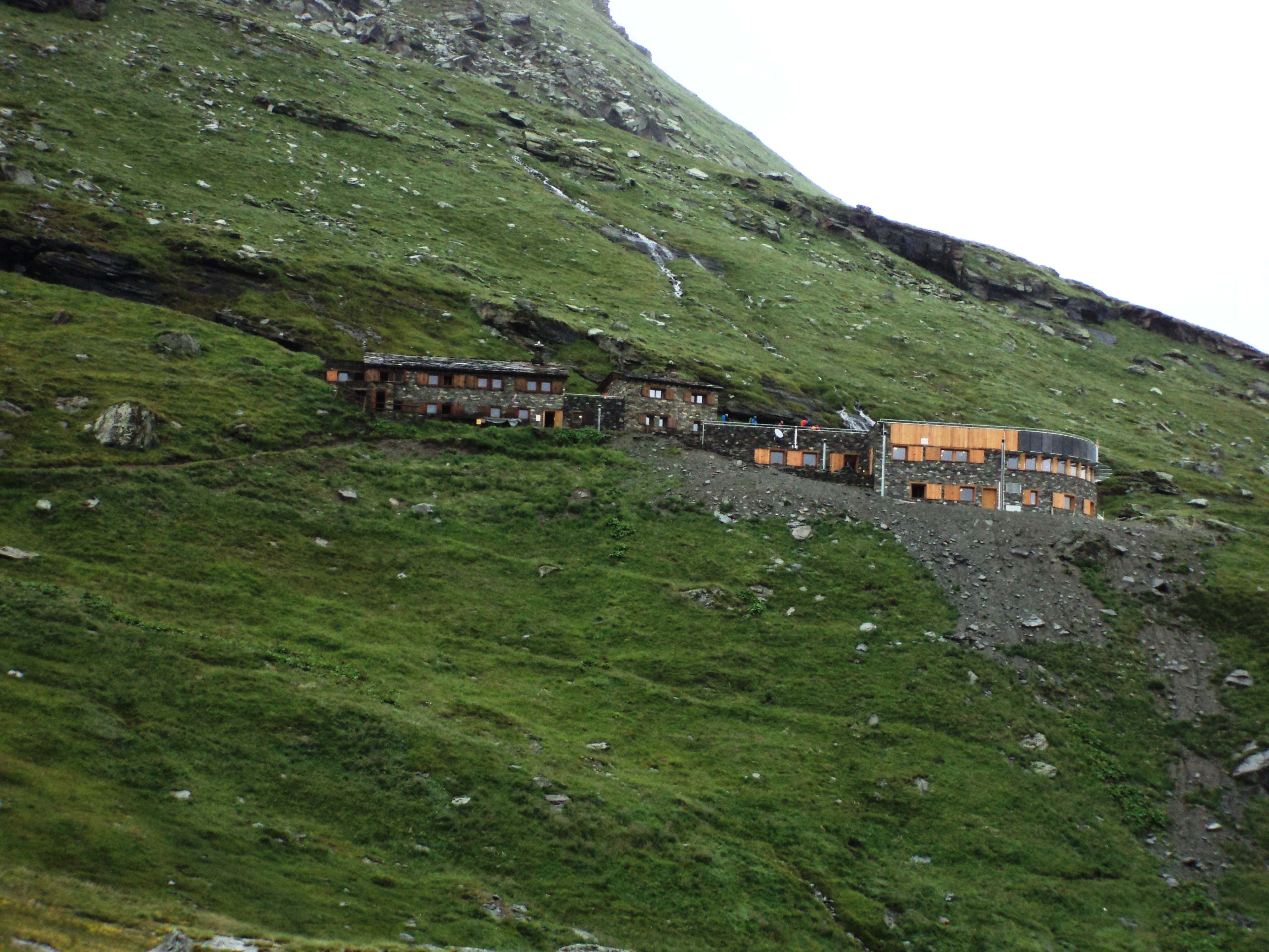 Il rifugio con gli ampliamenti inaugurati nel 2014